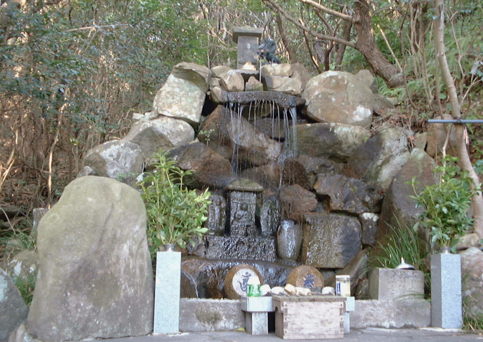 金龍庵阿部御水大師